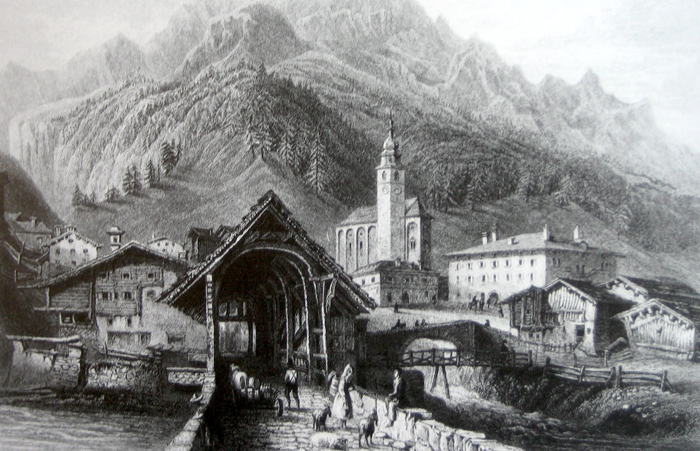 Splügen um 1830, Ansicht von Süden. Stich von W. H. Bartlett (1809 - 1854)